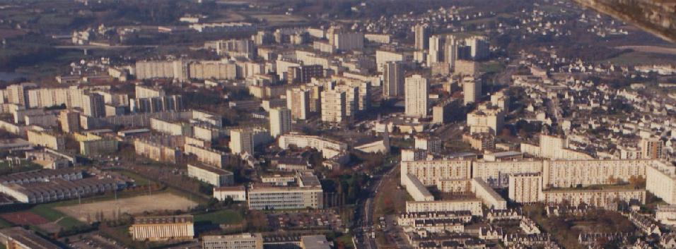 Vue d'ensemble du canton Brest 2 (Brest Bellevue)